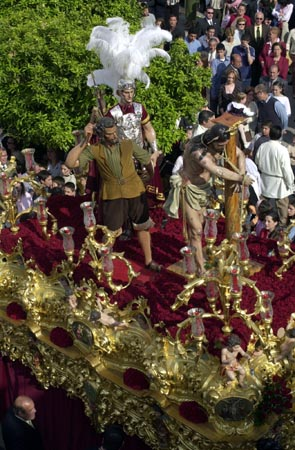 Hermandad del Cristo, que procesiona los jueves santo en Estepa.